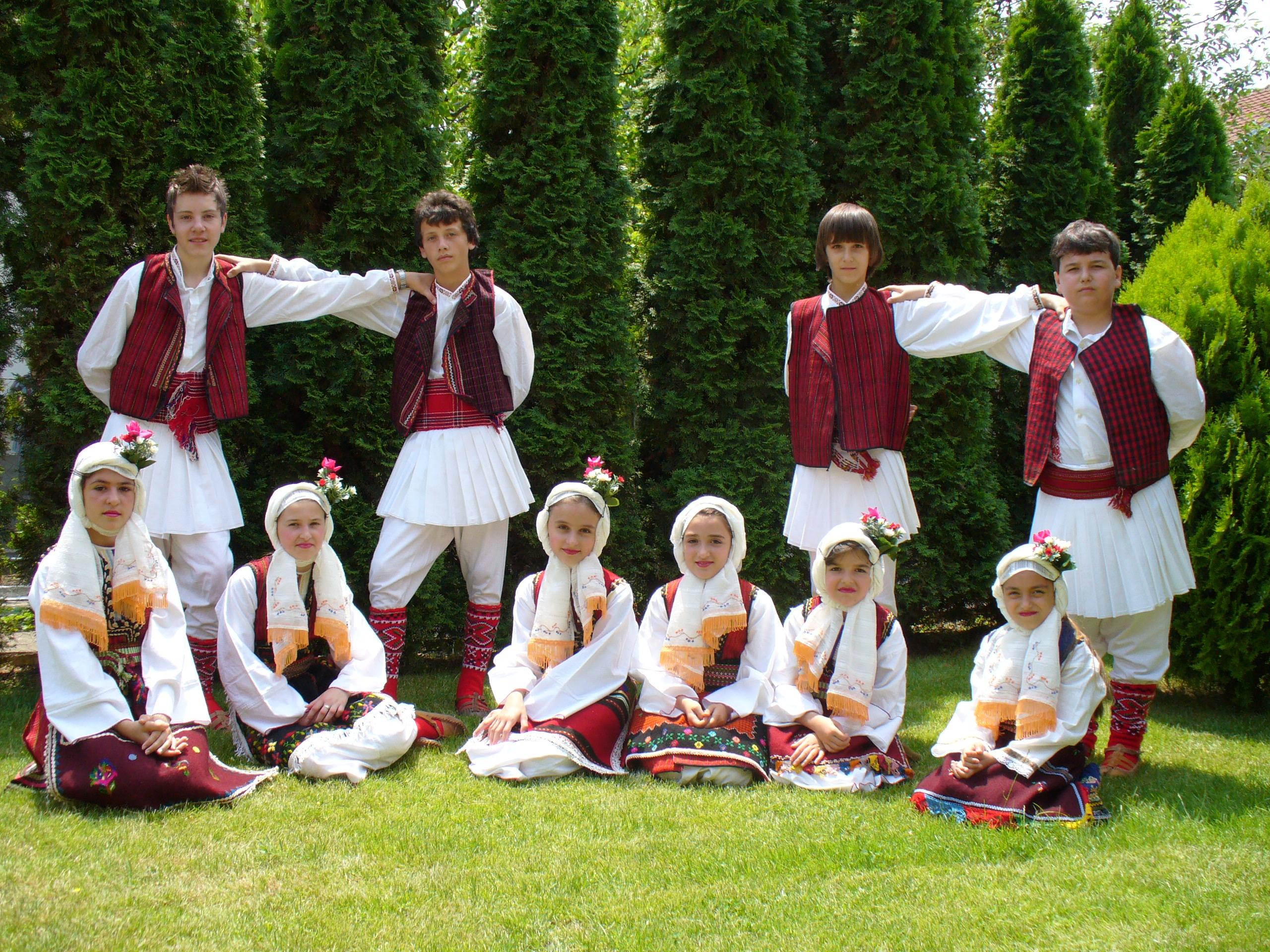 Седенка.